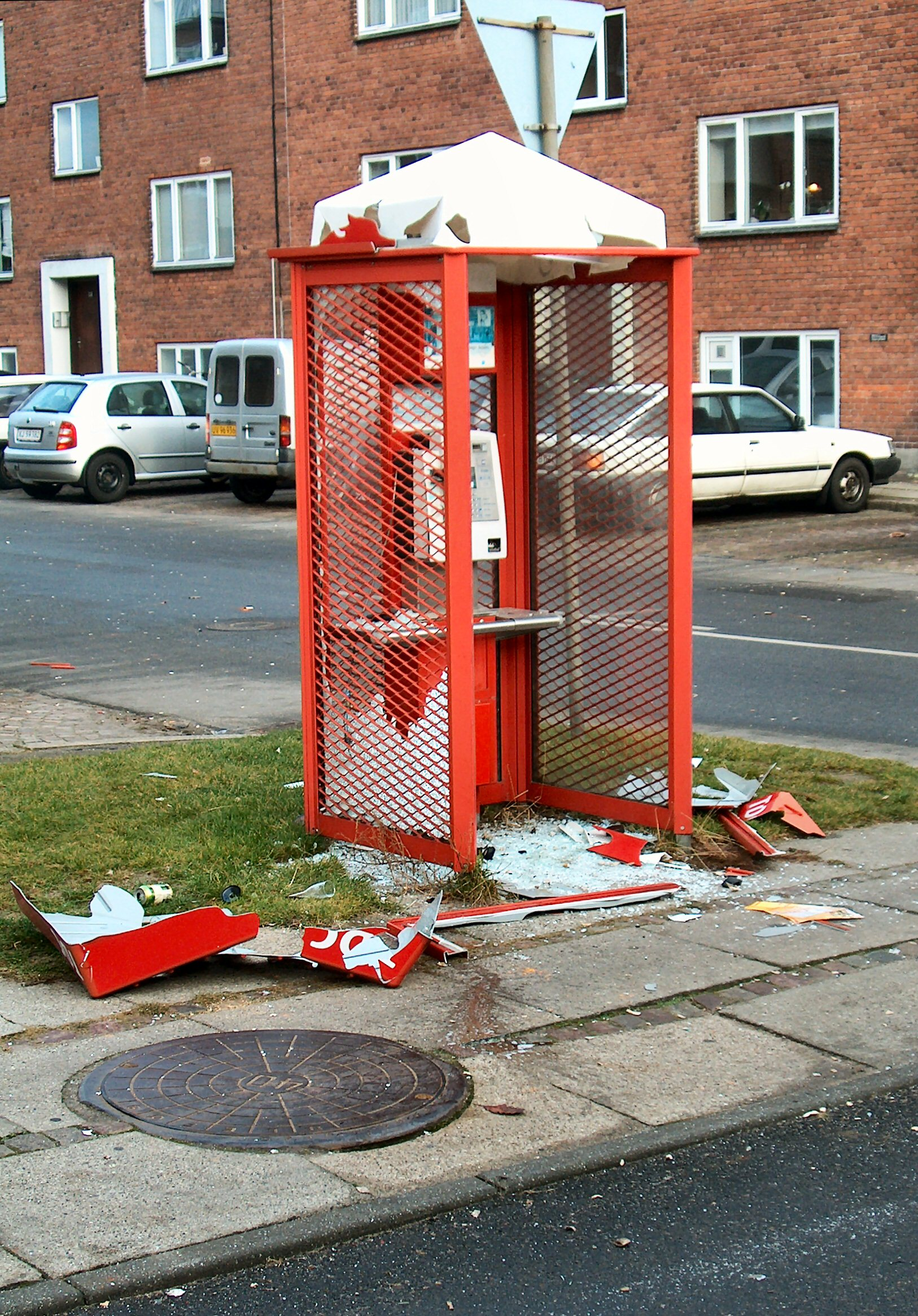 tekefonbox udsat for hærværk ved nytårstid på Silkeborgvej i Århus